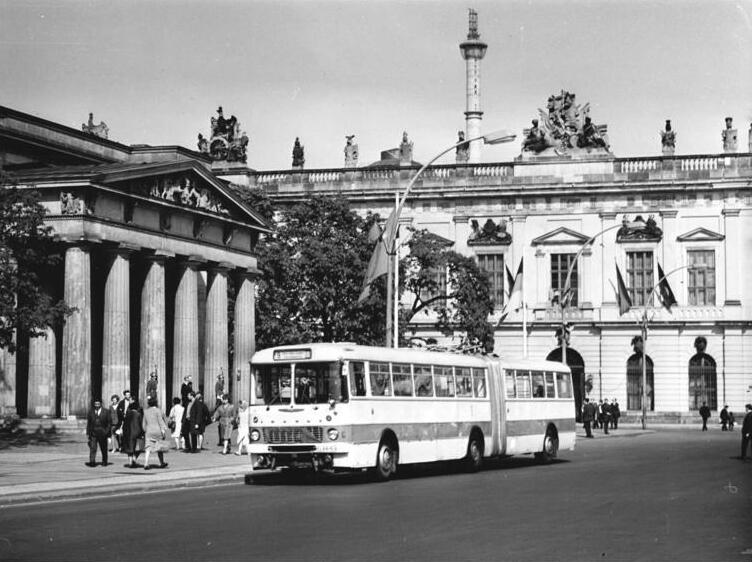 Zentralbild-Link-5.5.1967 Ungarischer Gelenk-Omnibus im Stadtbild von Berlin. Zu einem alltäglichen Bild im Berliner Straßenverkehr ist der ungarische Gelenk-Omnibus geworden (hier auf der Straße Unter den Linden vor dem Ehrenmal für die Opfer des Militarismus und Faschismus).